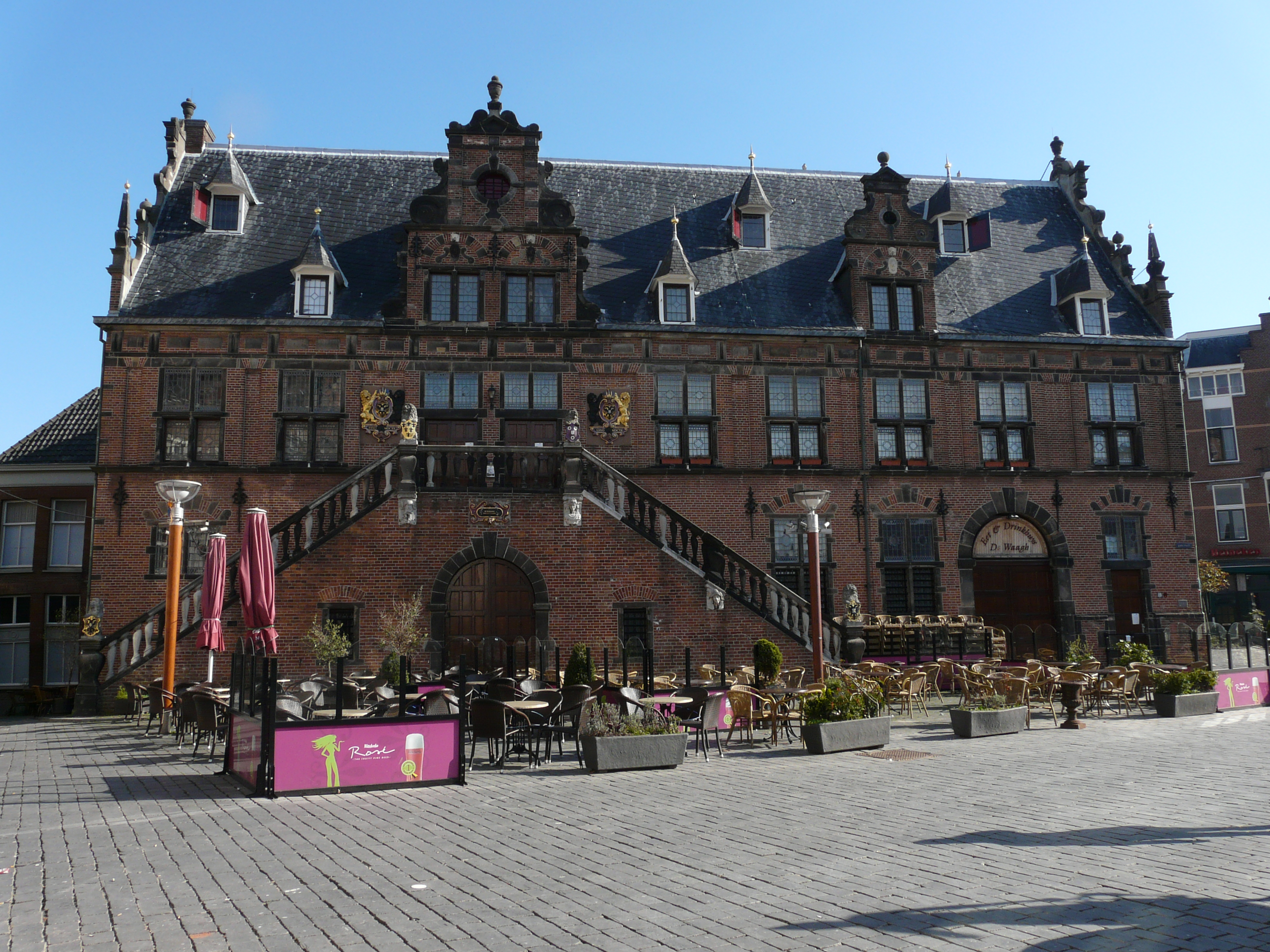 Zicht op een deel van het voormalige waaggebouw, Grote Markt 26, 6511 KB Nijmegen. Gelegen op de Grote Markt in het centrum van Nijmegen. Tegenwoordig is er de horeca-gelegenheid De Waagh in gevestigd